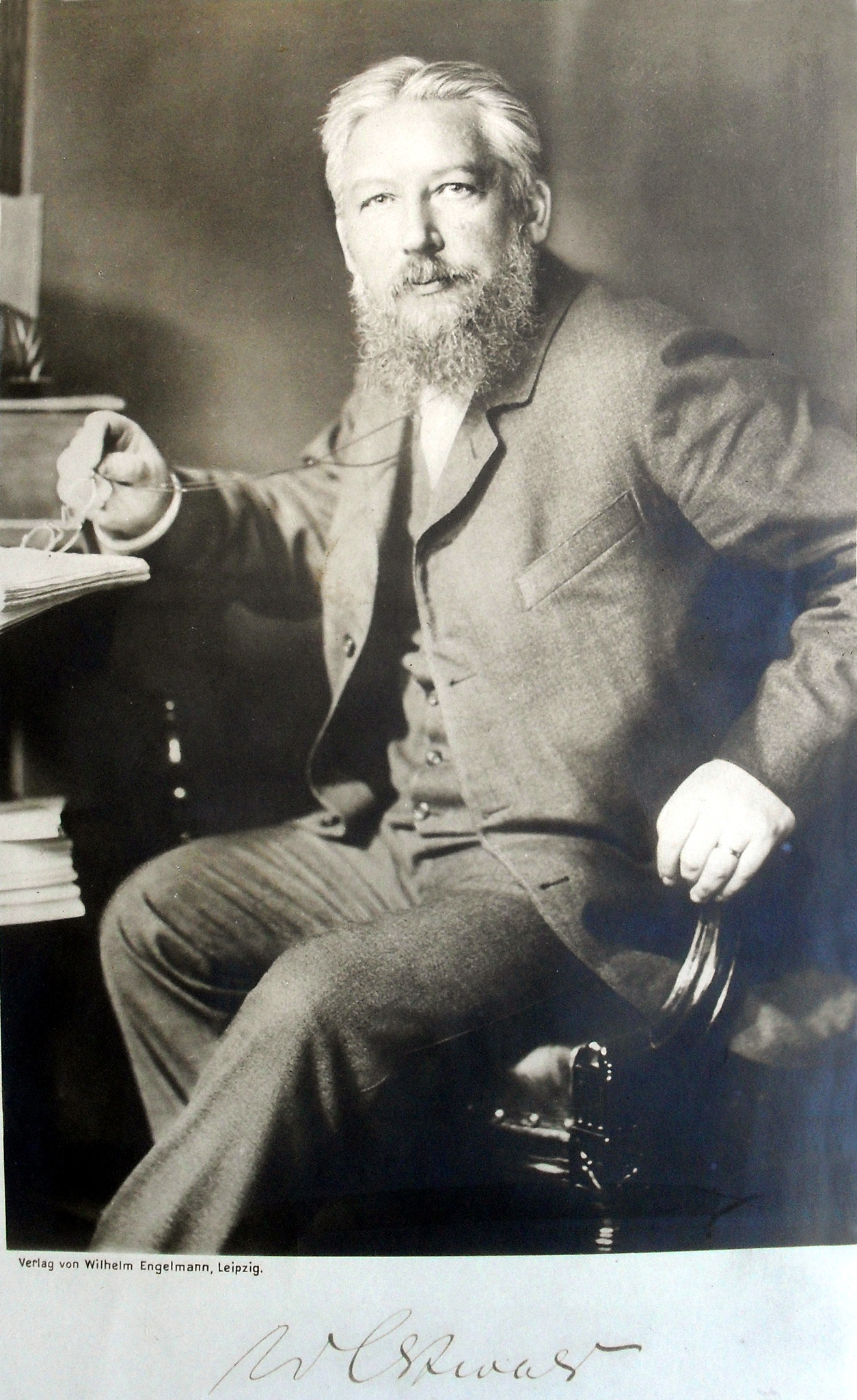 Wilhelm Ostwald (* 21. Augustjul./ 2. Septembergreg. 1853 in Riga; † 4. April 1932 in Leipzig)